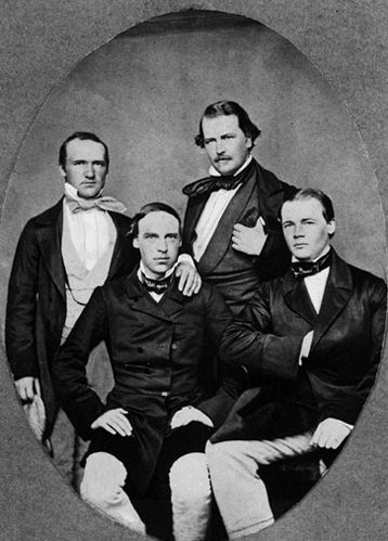 Studenter. F.v.: Carl Salomonsen, Ditmar Meidell, Christian Lasson og Ole Richter.